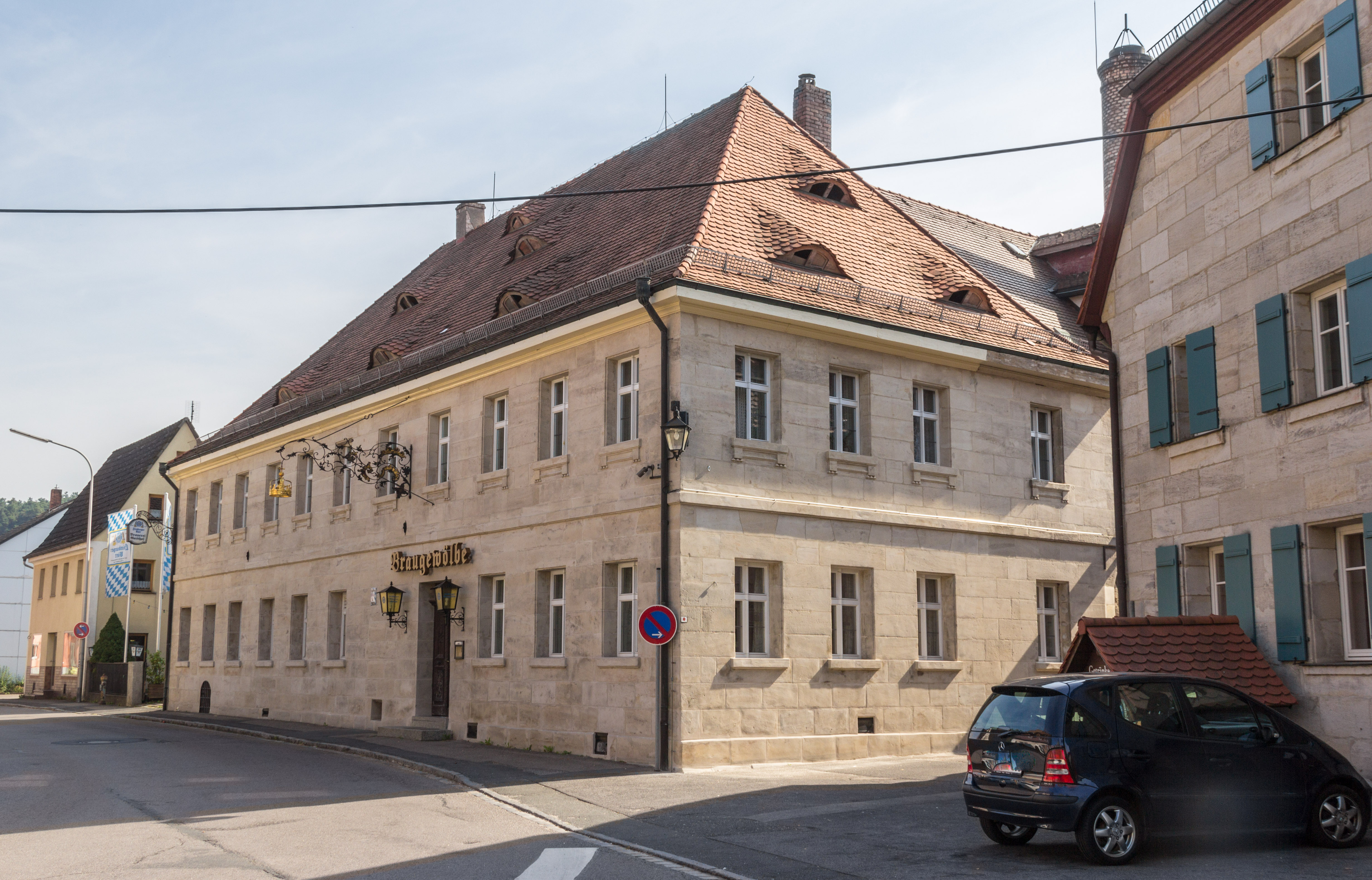 Gasthof in Leinburg, Marktplatz 14